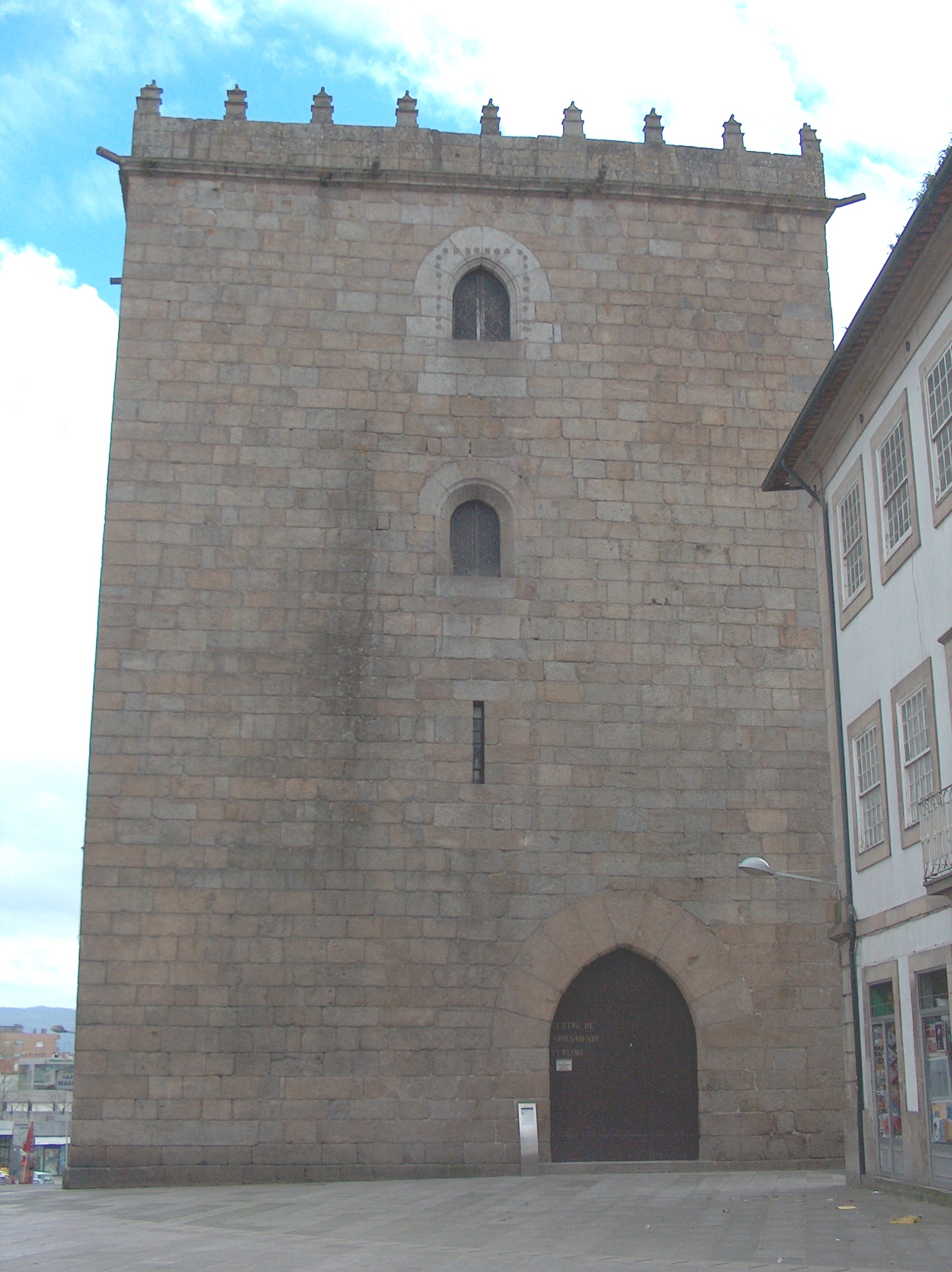 Torre do Cimo da Vila. Torre do Cimo da Vila, Barcelos, distrito de Braga, Portugal.